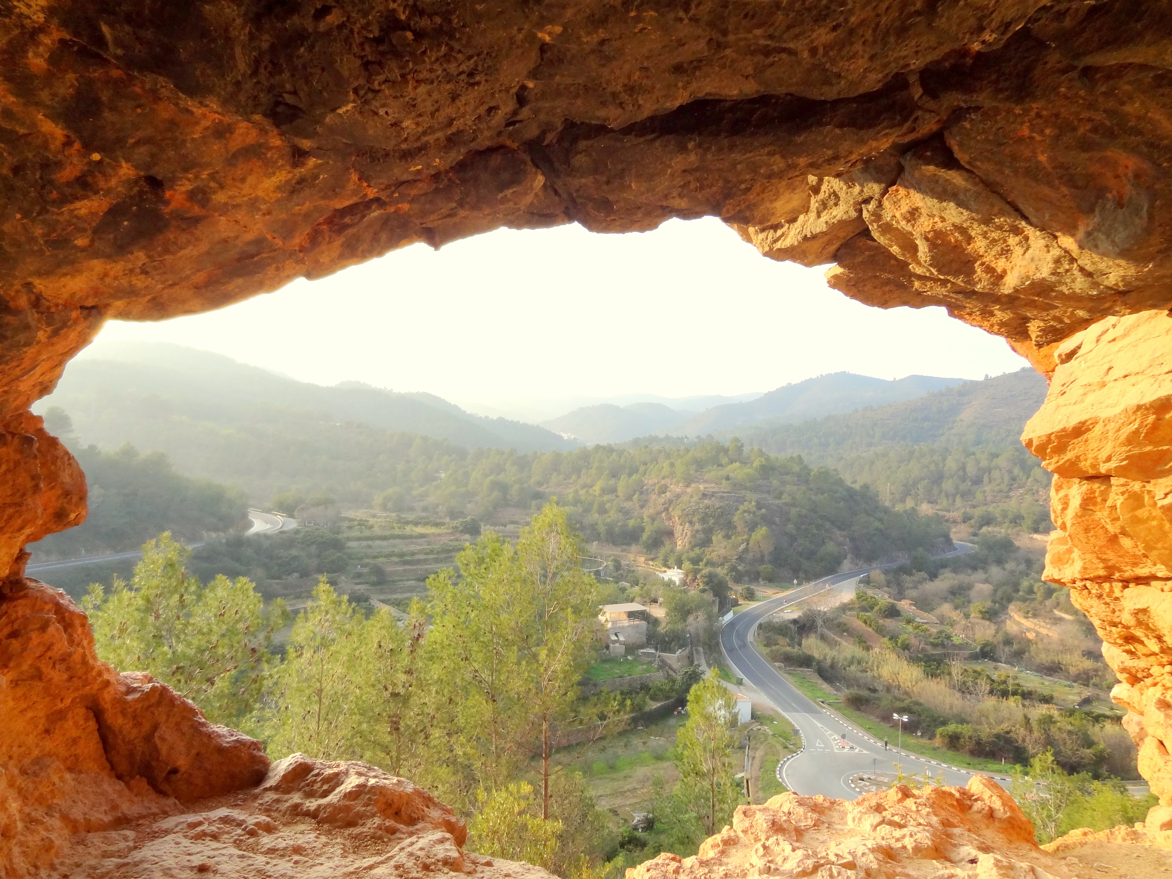 Vistes des de la Cova del Castell, situada davall del castell del municipi de Tales, a la comarca de la Plana Baixa.